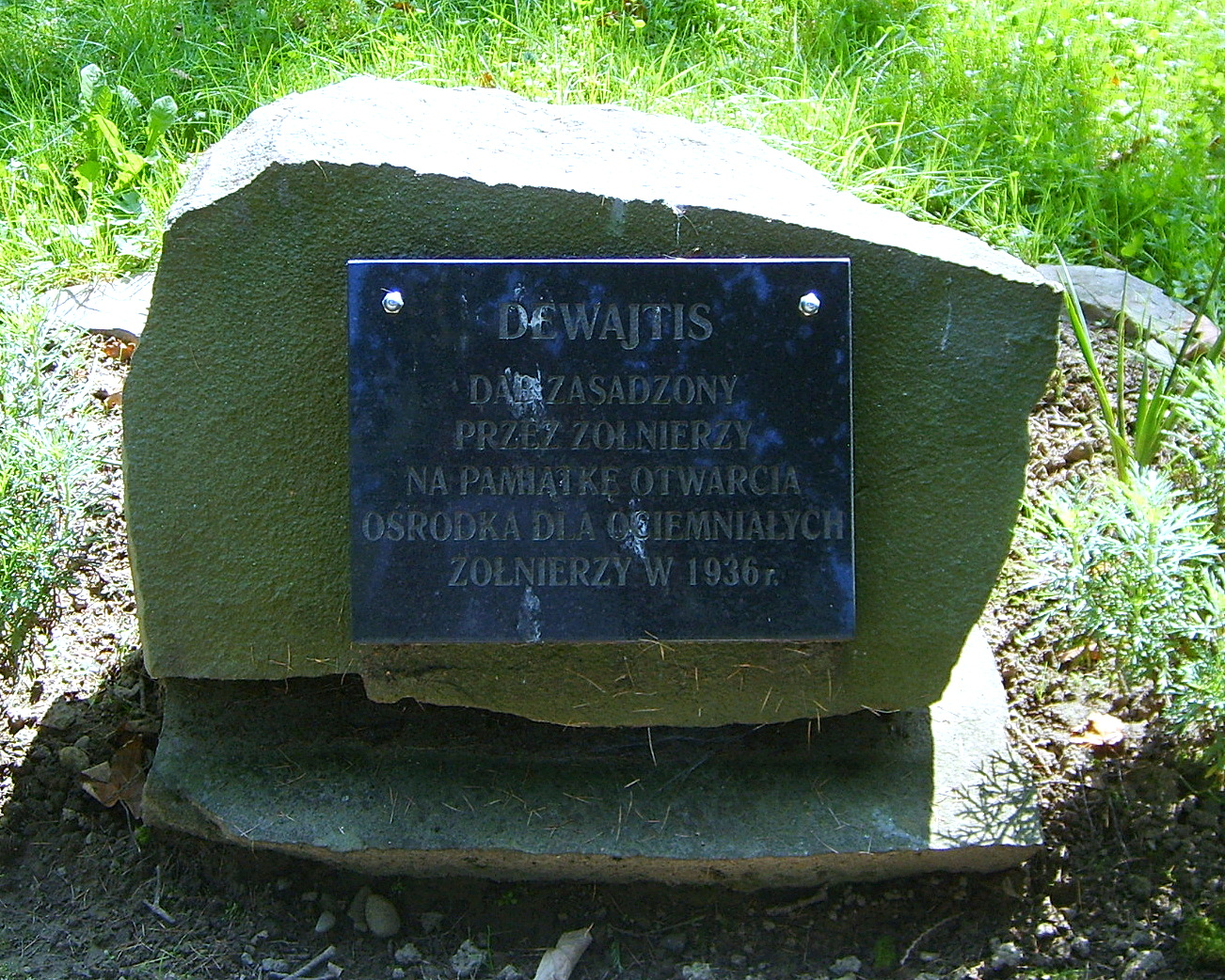 Dąb pamiątkowy "Dewajtis" upamiętniający założenie Ośrodka dla Ociemniałych w Muszynie w 1936.